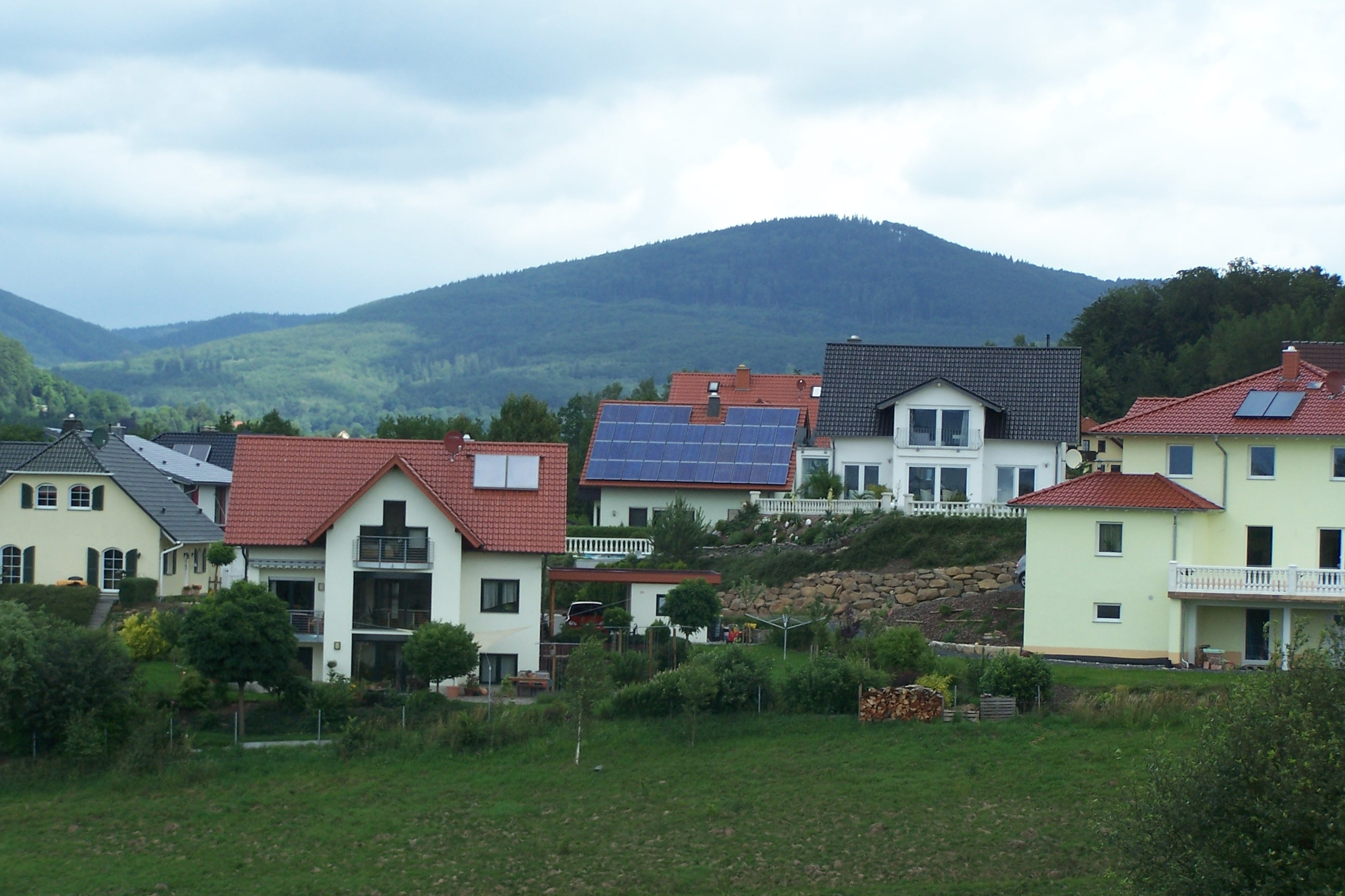 Neubaugebiet am Rand des Marienthaler Hölzchens.